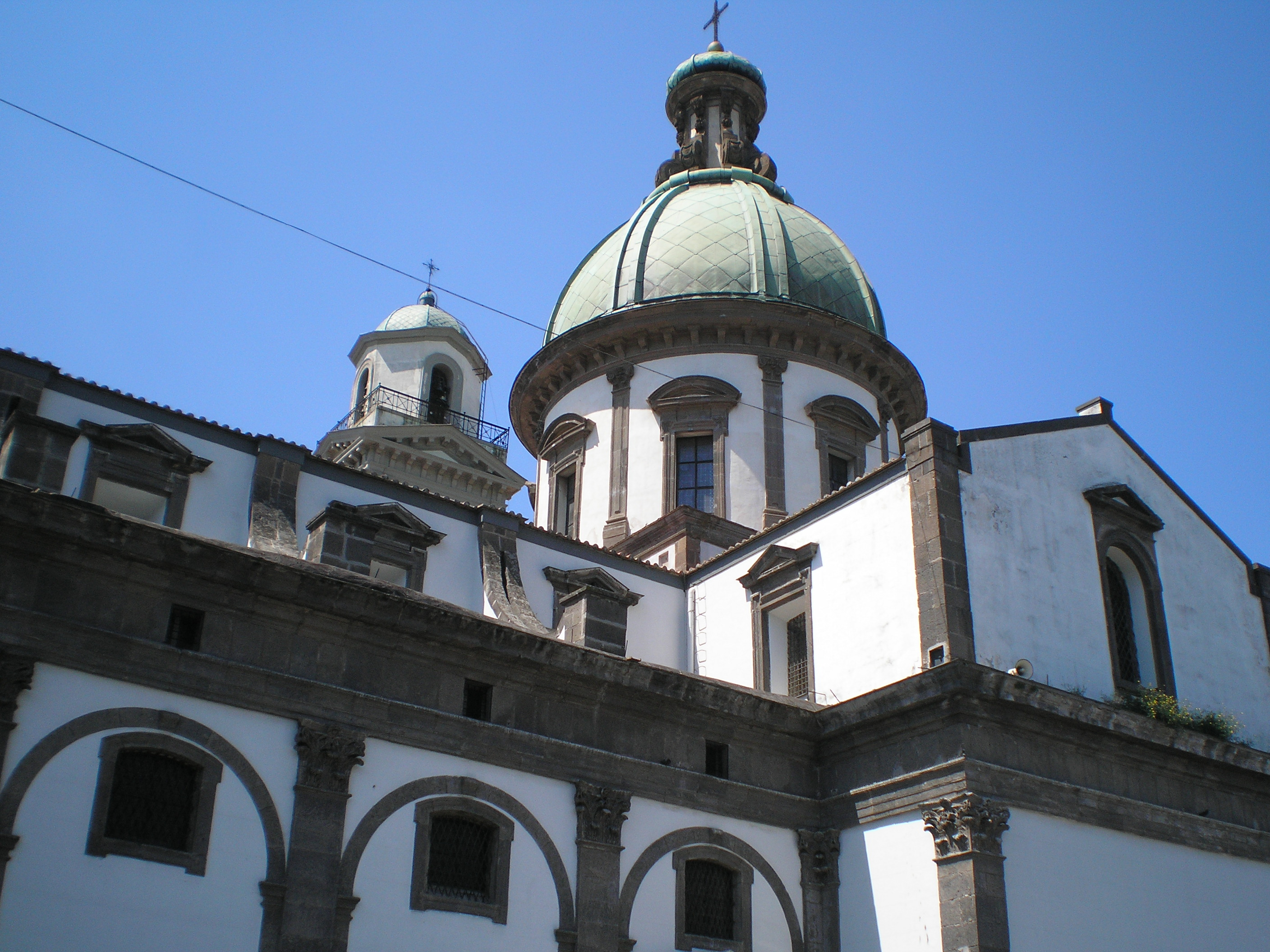 Madonna dell Arco FOTO DI PEPPE PEPE DI ANGRI